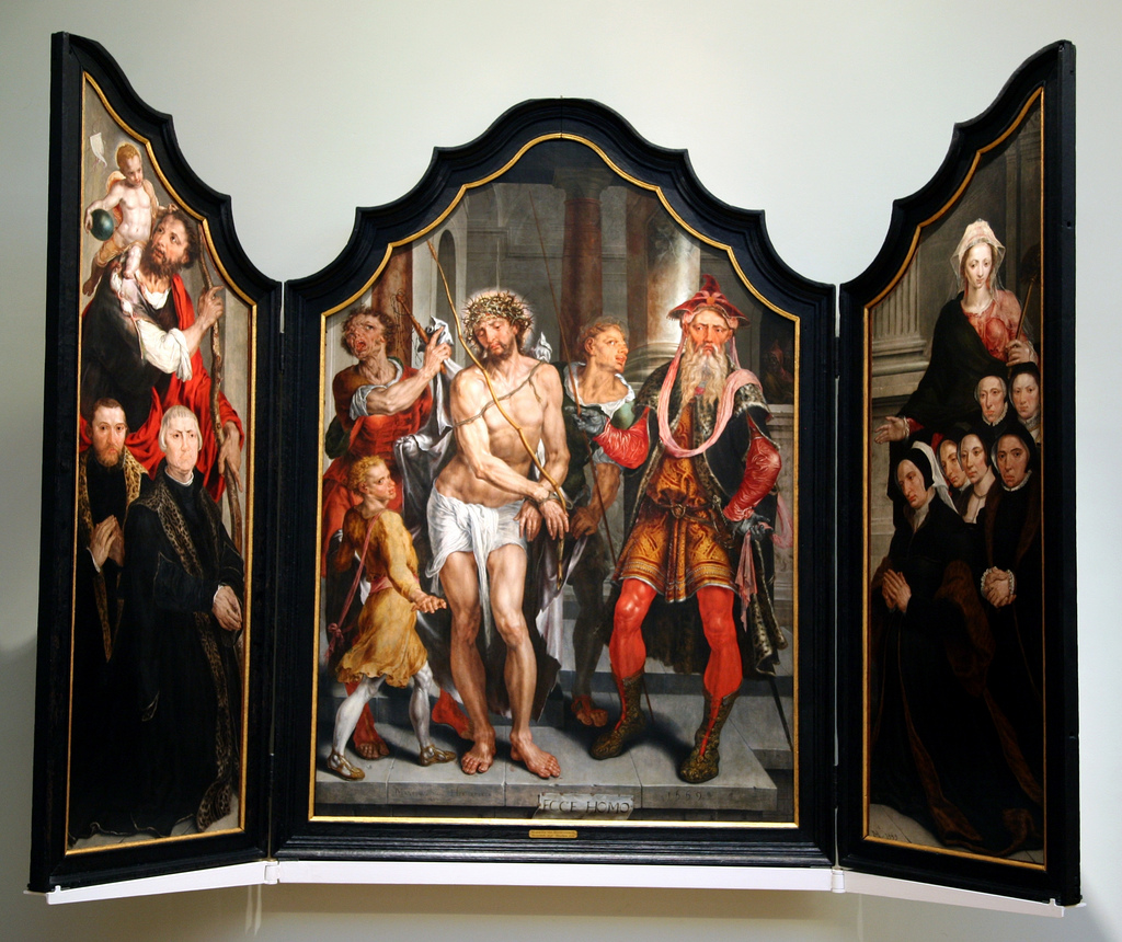 Maerten van Heesmkerck – Drieluik met Ecce homo 28003-Maarten van Heemskerck-Ecce homo